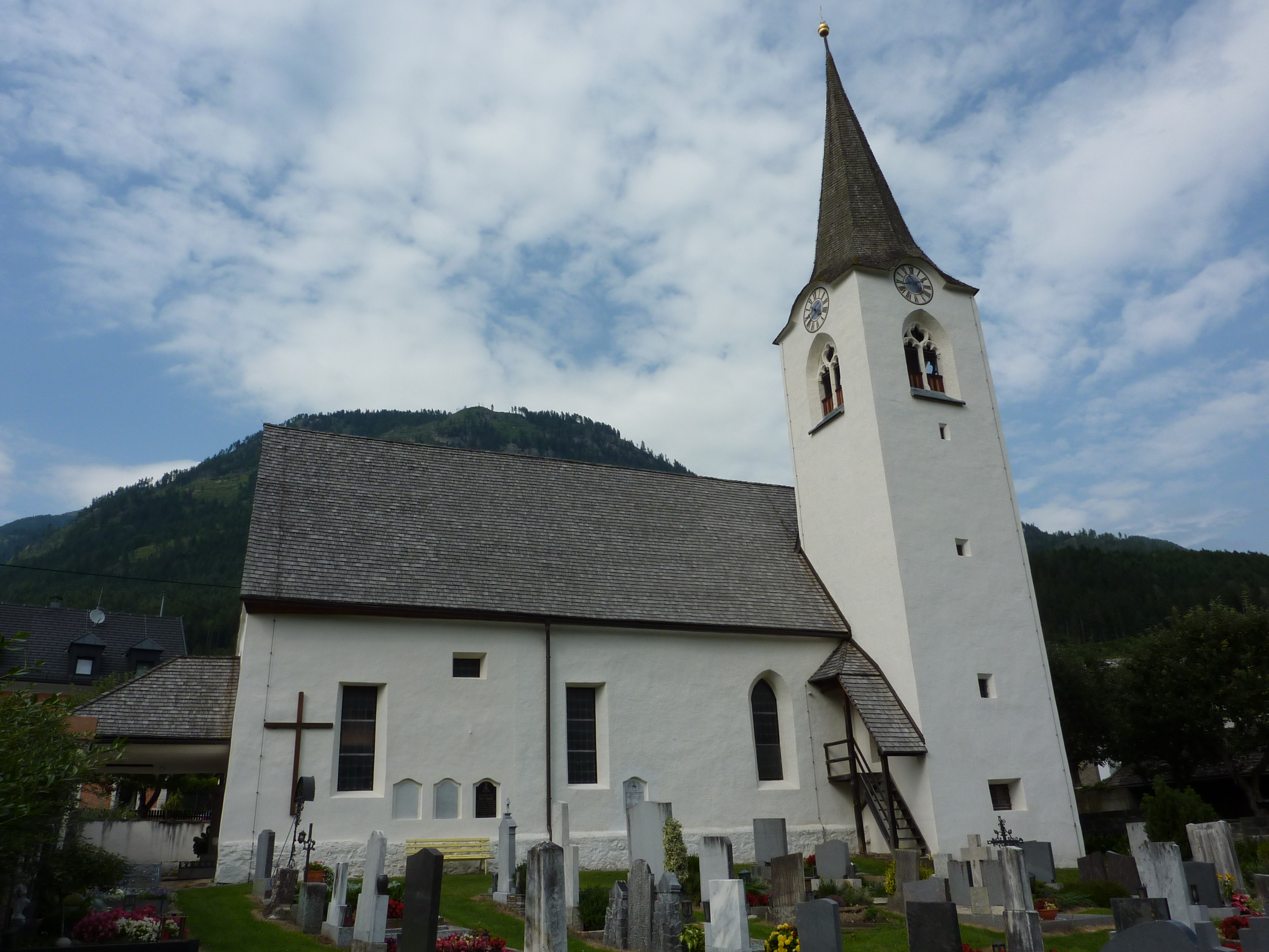 Mühldorf, Kärnten, Pfarrkirche - Südseite